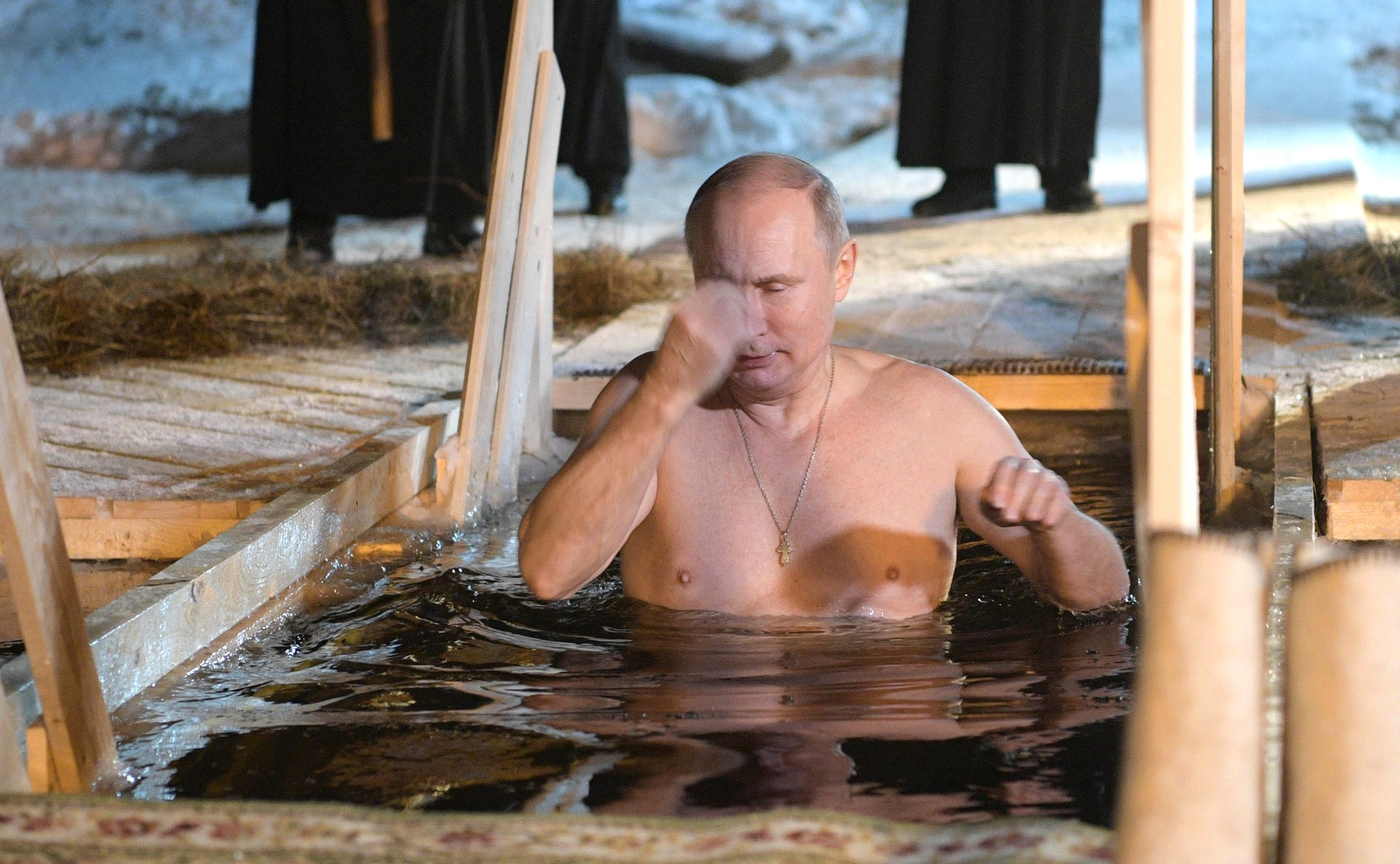 Владимир Путин поучаствовал в крещенских купаниях на озере Селигер.